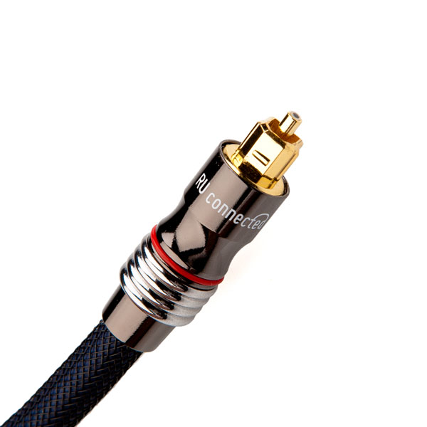 Toslink connector of RU connected